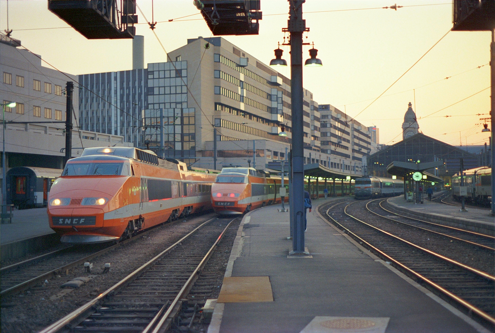 Rames TGV Sud-Est en version d'origine orange, en gare de Paris-Lyon.